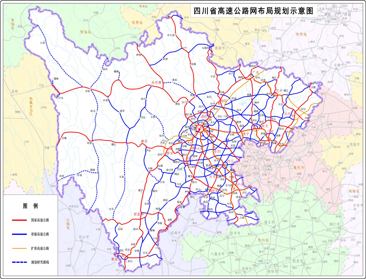 《四川省高速公路网规划（2019—2035年）》中的附图，展示了四川省全境的高速公路网规划布局。国家高速公路和省级高速公路共同组成了四川省18条成都放射线、9条纵线、9条横线、4条环线、34条联络线。